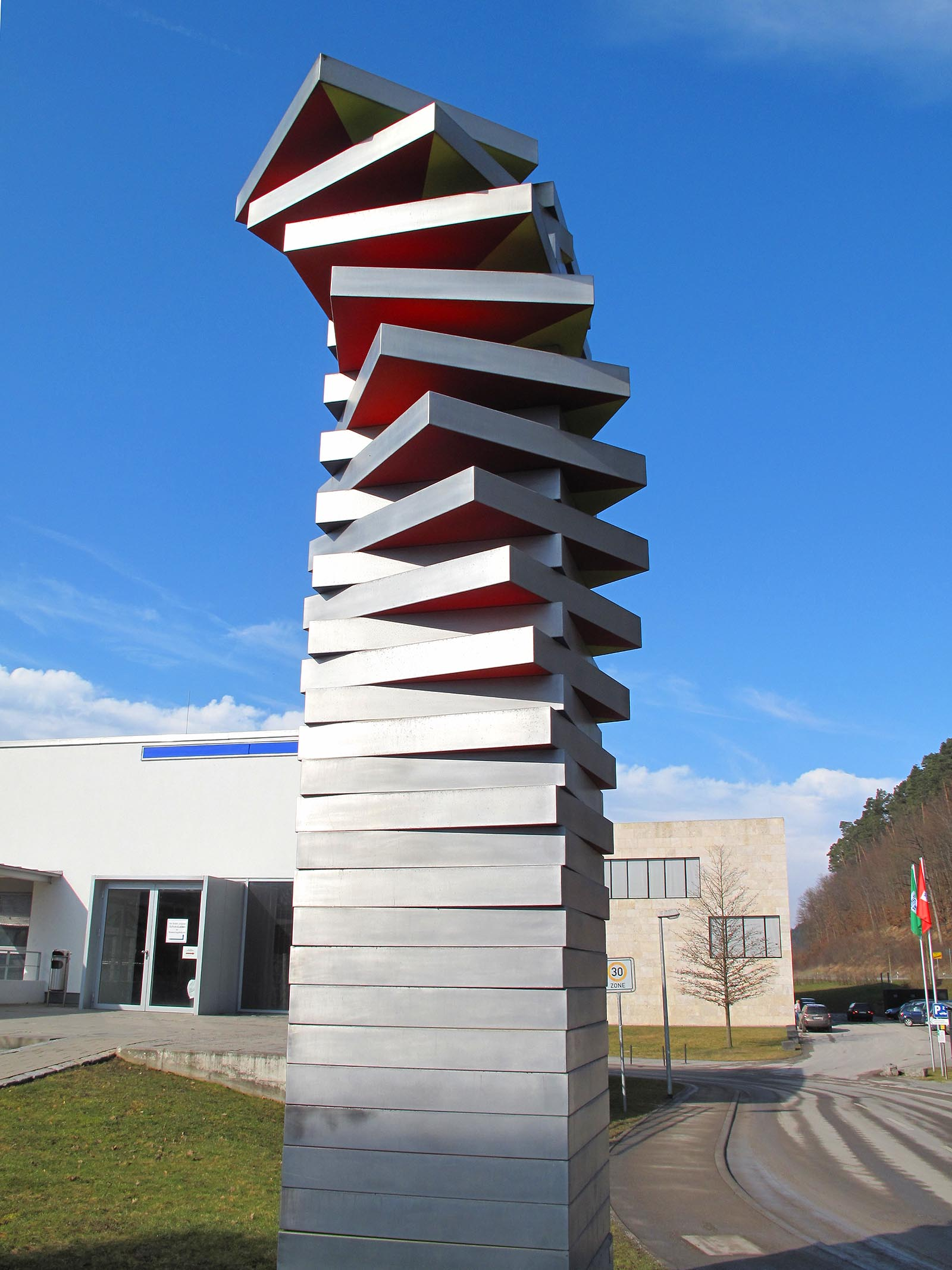 Herbert Volz, Quadrate in Bewegung – Farbe und Reflexion, 2001, - Deutschland, Baden-Württemberg, Waldenbuch